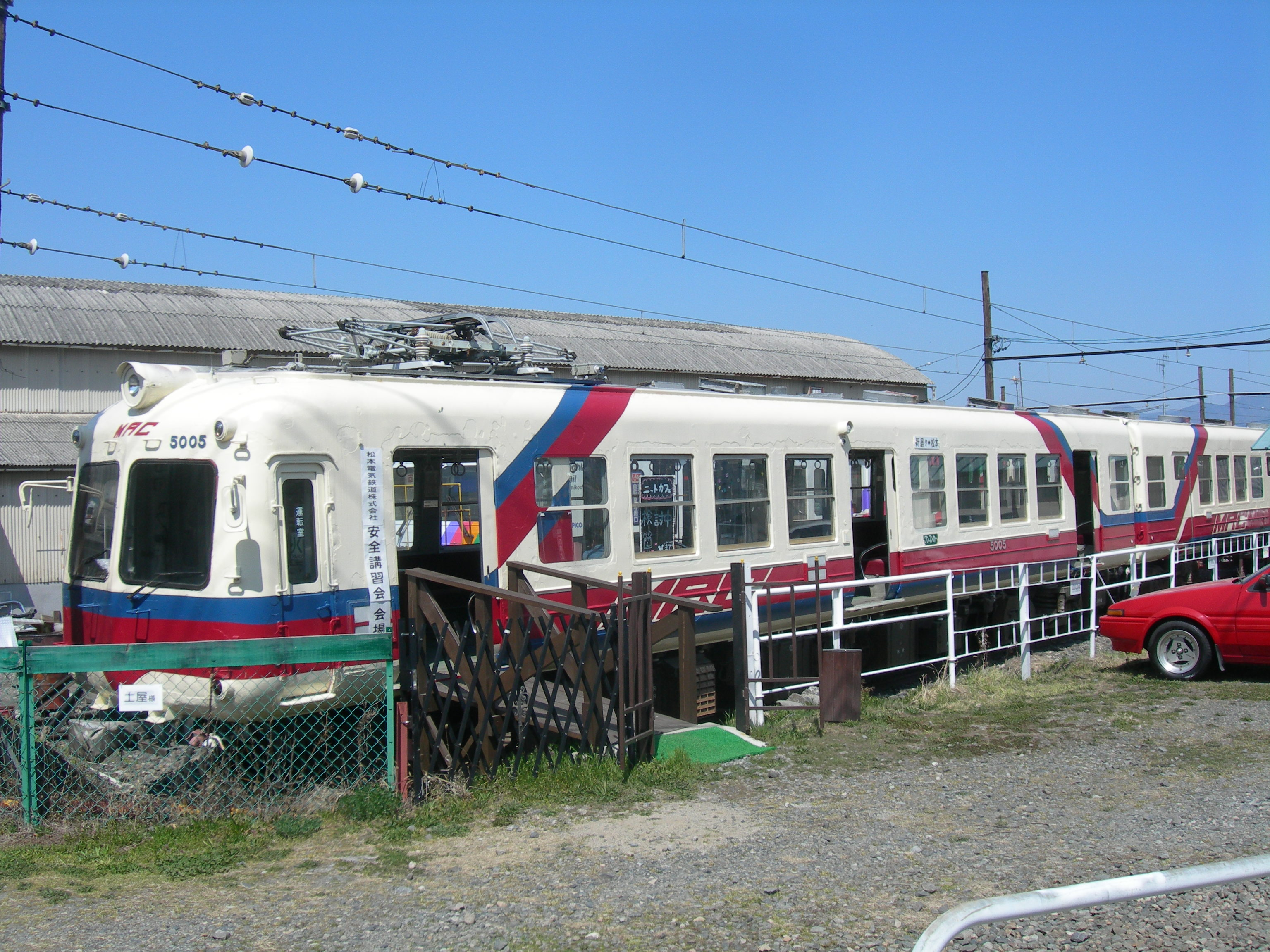 新村駅 (長野県) 構内に保存されている 松本電気鉄道5000系電車